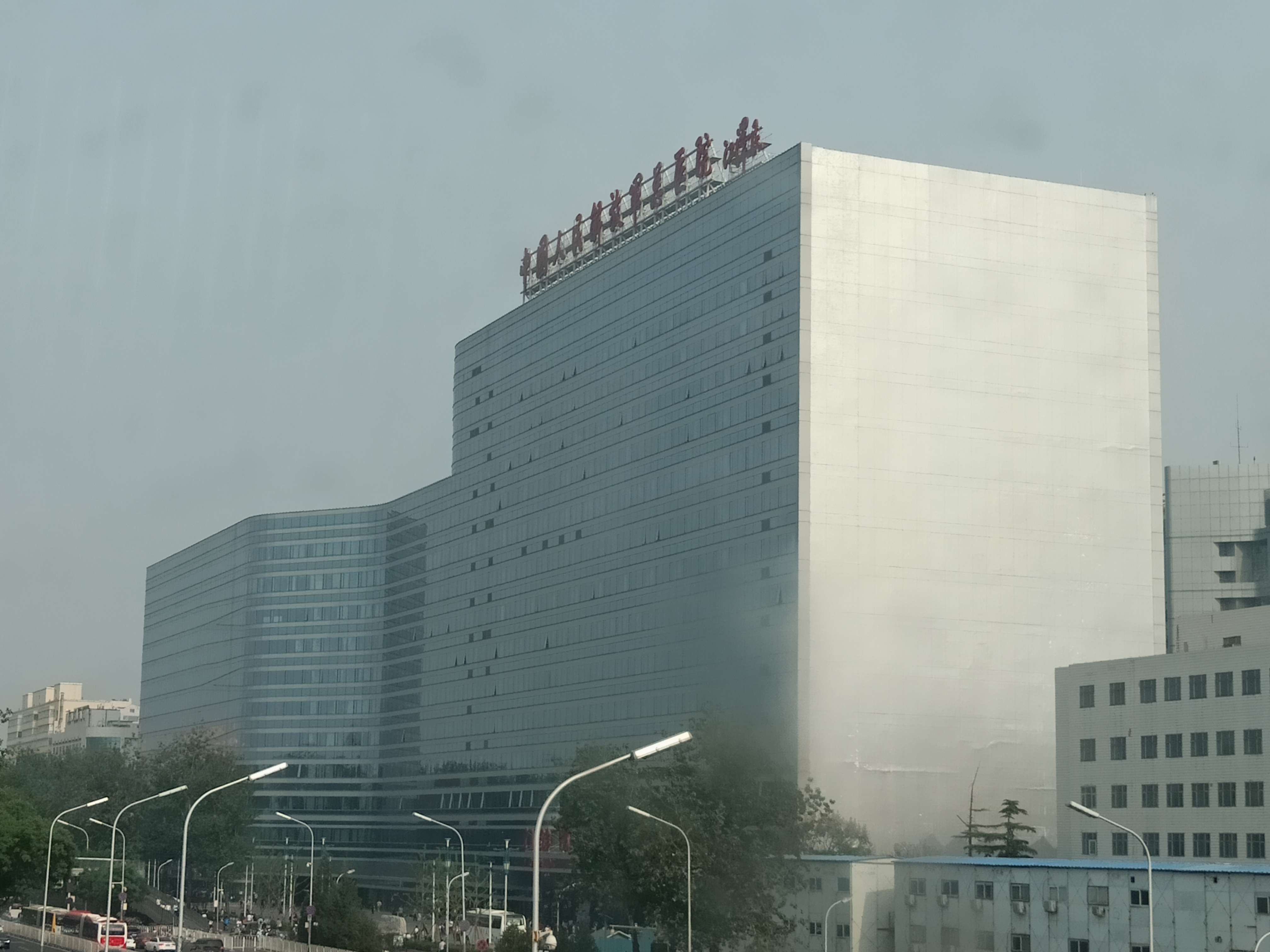 粵語: 中國人民解放軍總醫院